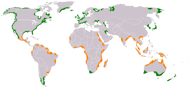 Carte des milieux halophytes:En jaune, les mangroves. En vert, les schorres.